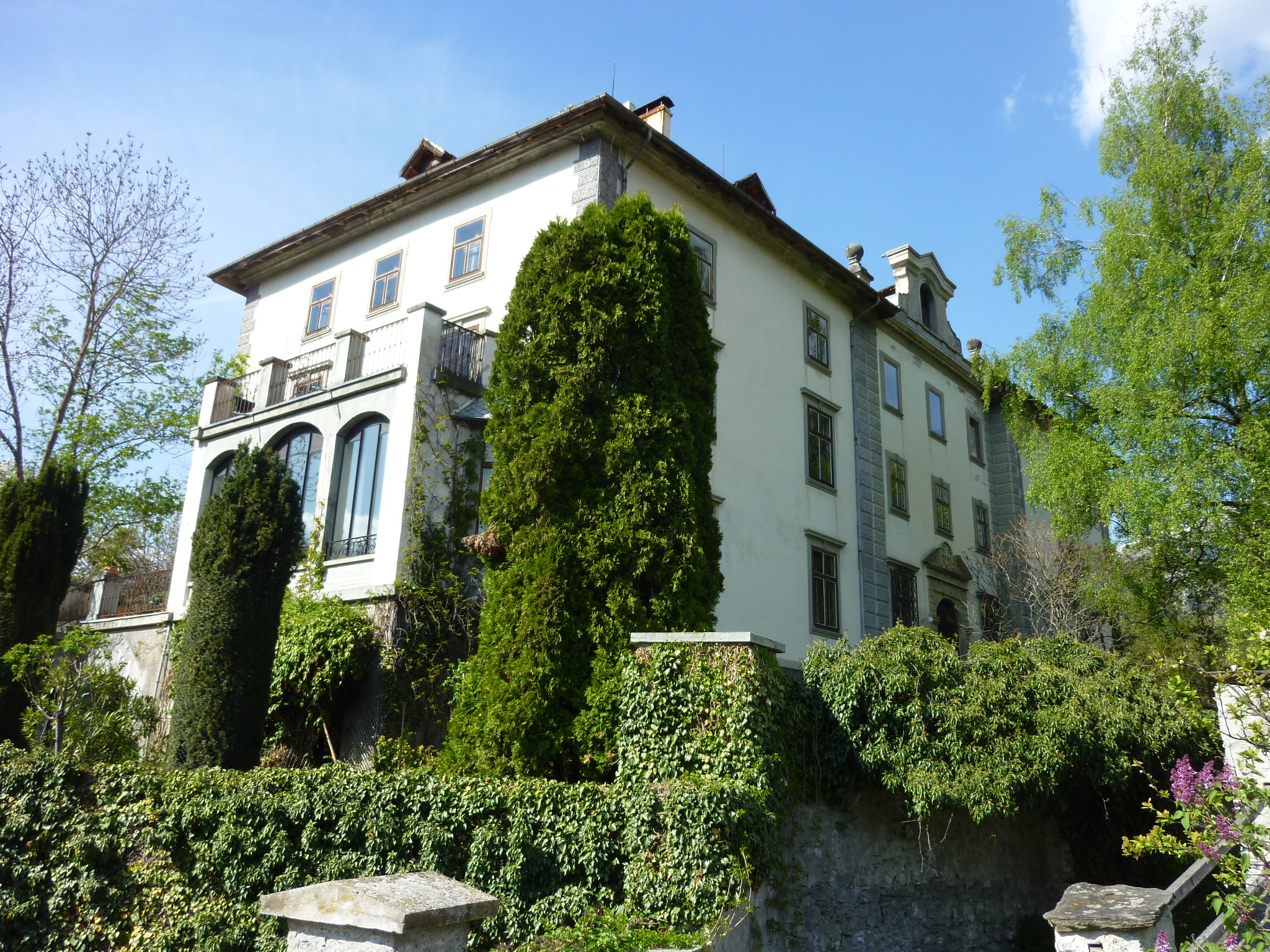 Bischöfliches Schloss Schauenstein Ansicht von Südwest